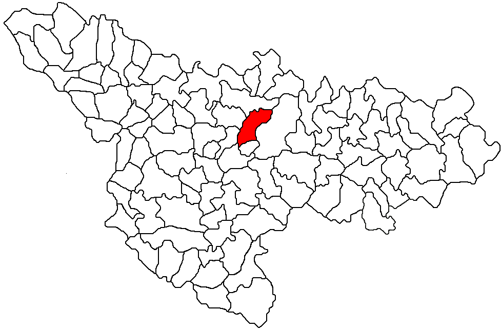 Categorie:Hărţi ale judeţului Timiş